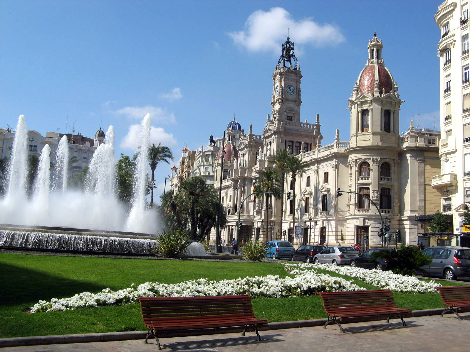 Ayuntamiento de Valencia, en Valencia (España).